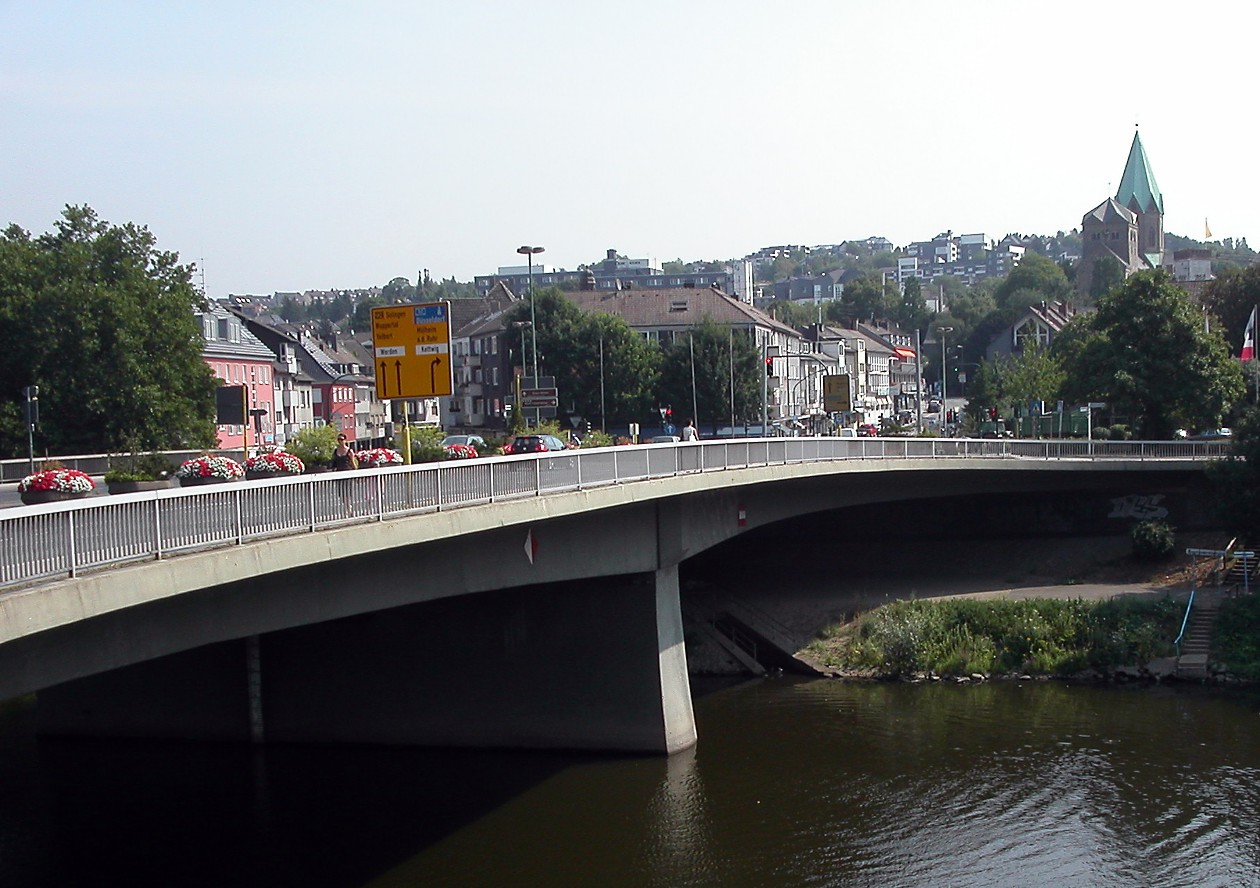 Essen-Werden, Diese Straße B224 führt Weiter Richtung Heidhausen und Fischlaken ebenfalls Stadtteile Essens